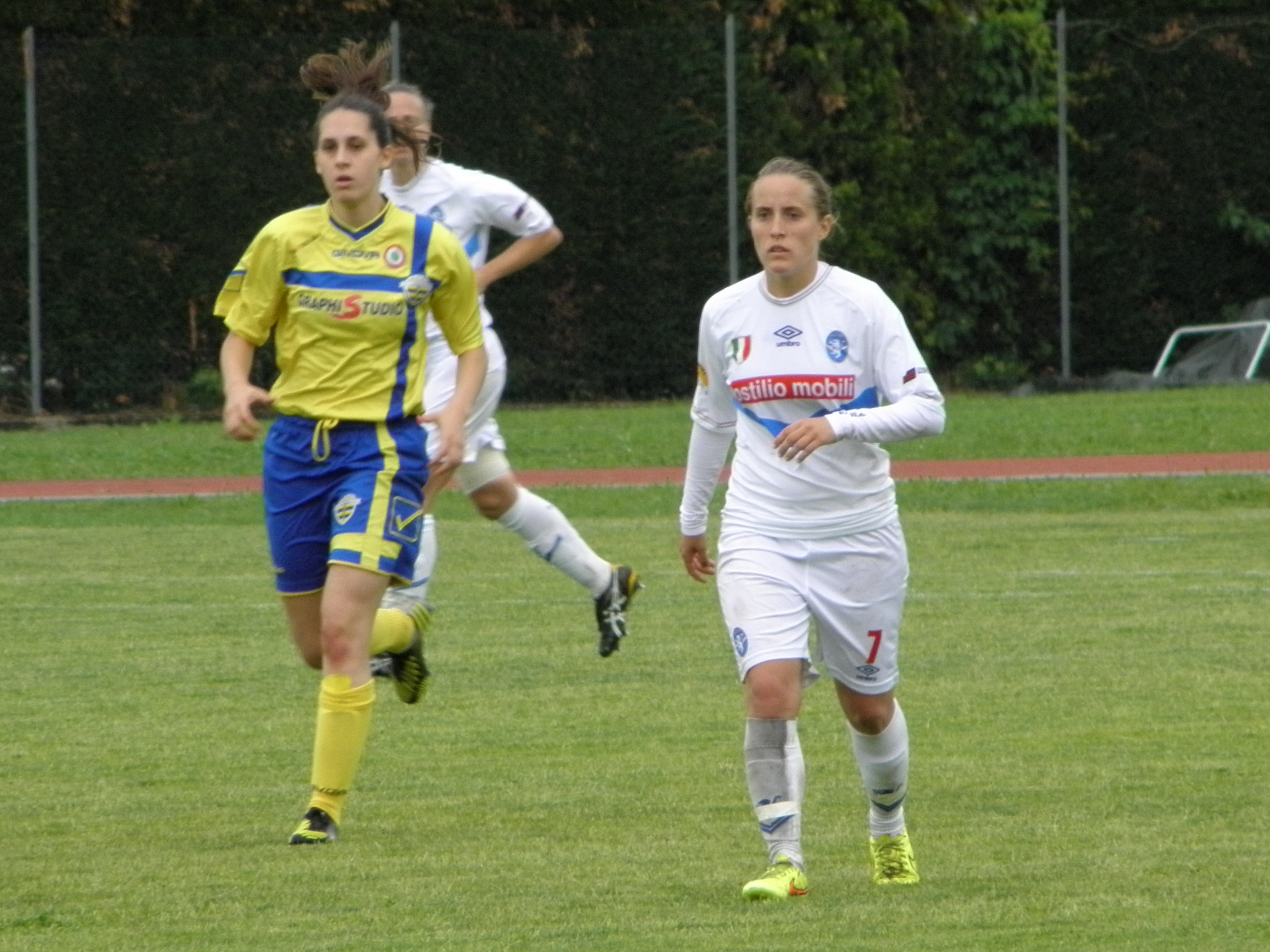 Abano Terme, 23 maggio 2015, finale di Coppa Italia di calcio femminile 2014-2015: Valentina Cernoia, centrocampista del Brescia, durante una fase di gioco.